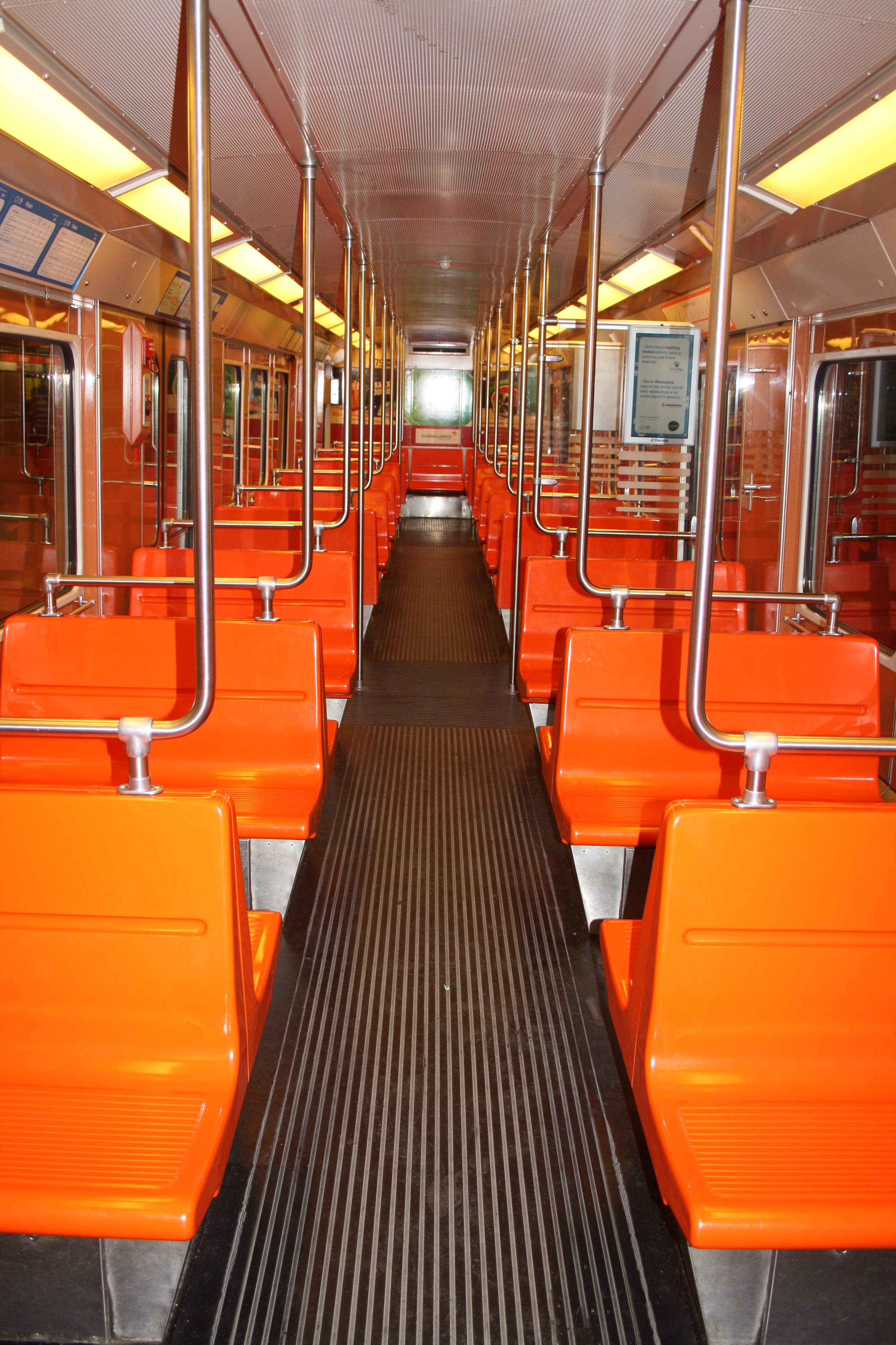 Interiör på vagn i Helsingfors